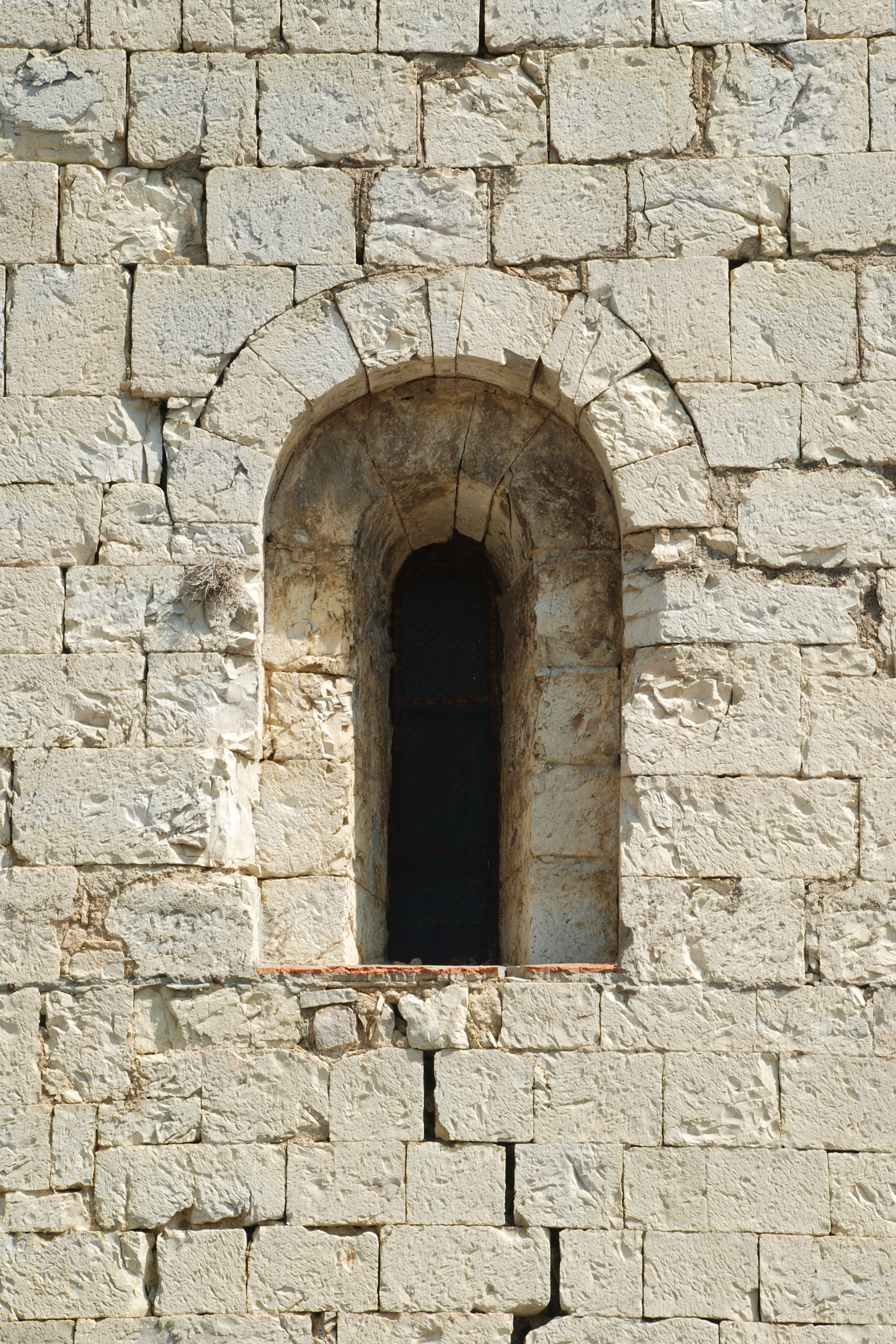 France - Languedoc - Hérault - Église de Sainte-Croix-de-Quintillargues